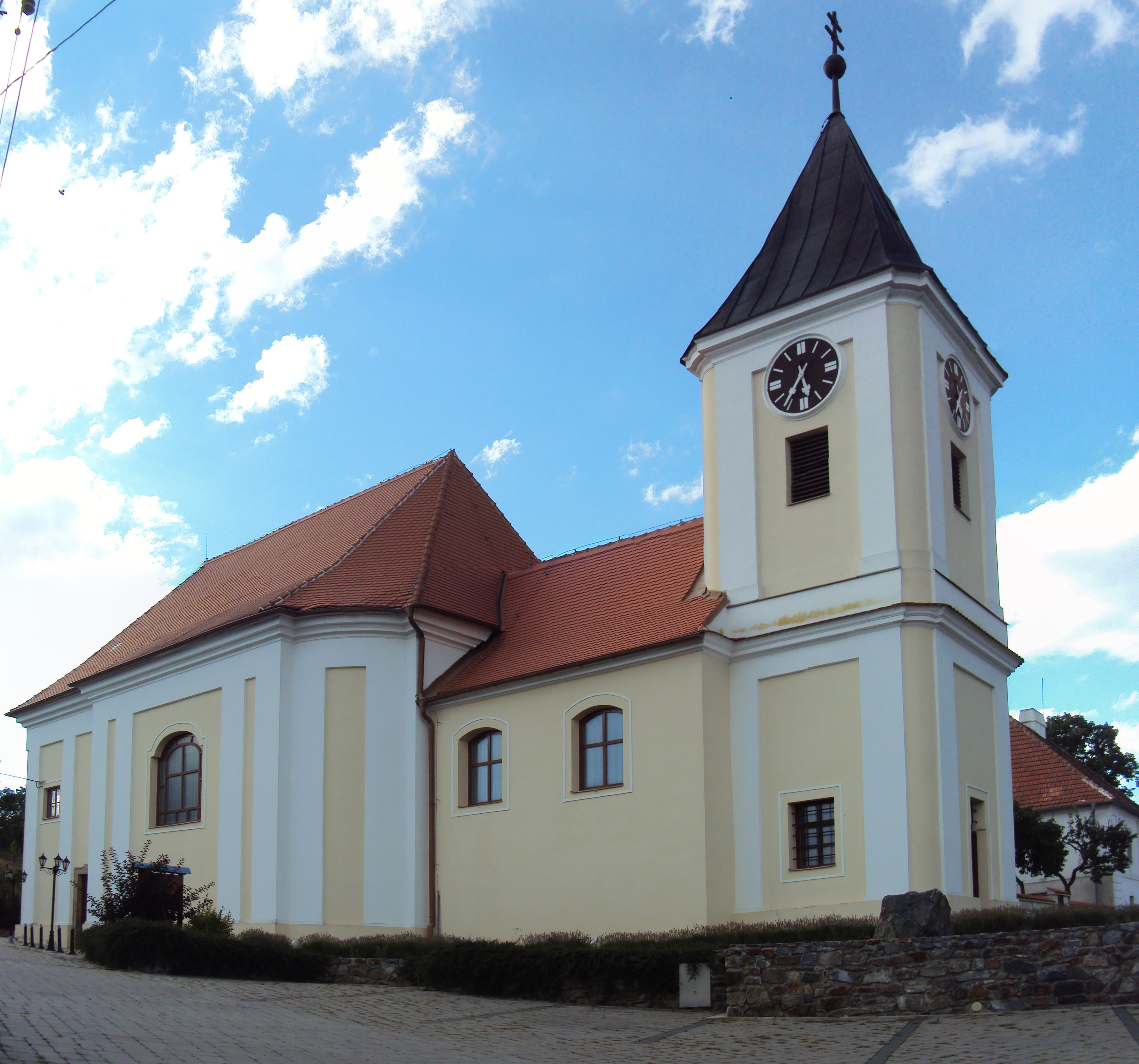 Čučice, kostel sv.Jakuba Staršího